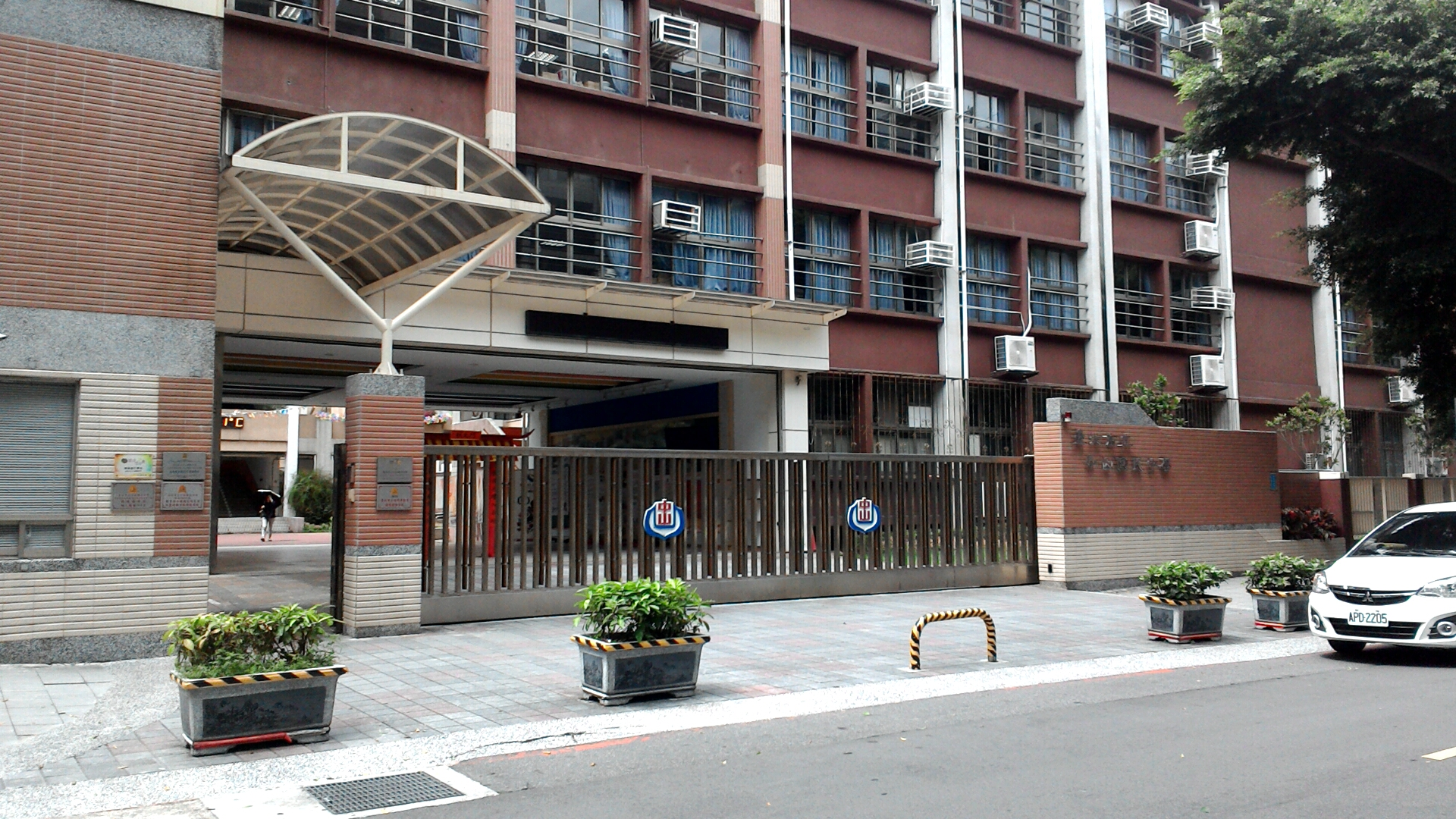 台北市立中山國民中學,台北市松山區東社次分區民有里